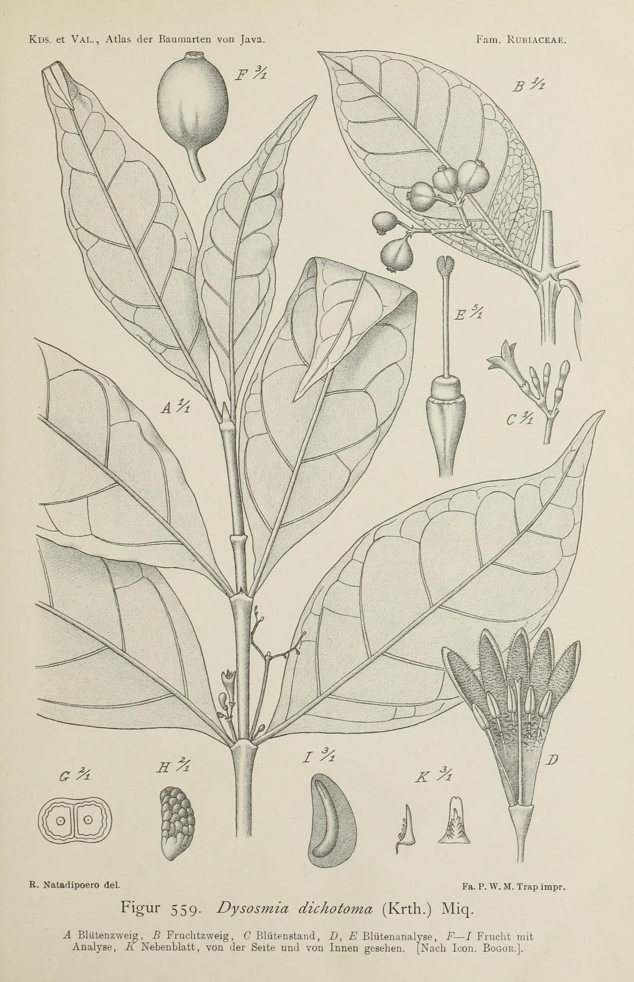 Atlas der baumarten von Java : im anschluss an die "Bijdragen tot de kennis der boomsoorten van Java" / zusammengestellt von dr. S.H. Koorders und dr. Th. Valeton ; mit unterstützung der Niederländsch- indischen regierung ; Herausgegeben von dr. S.H. Koorders.